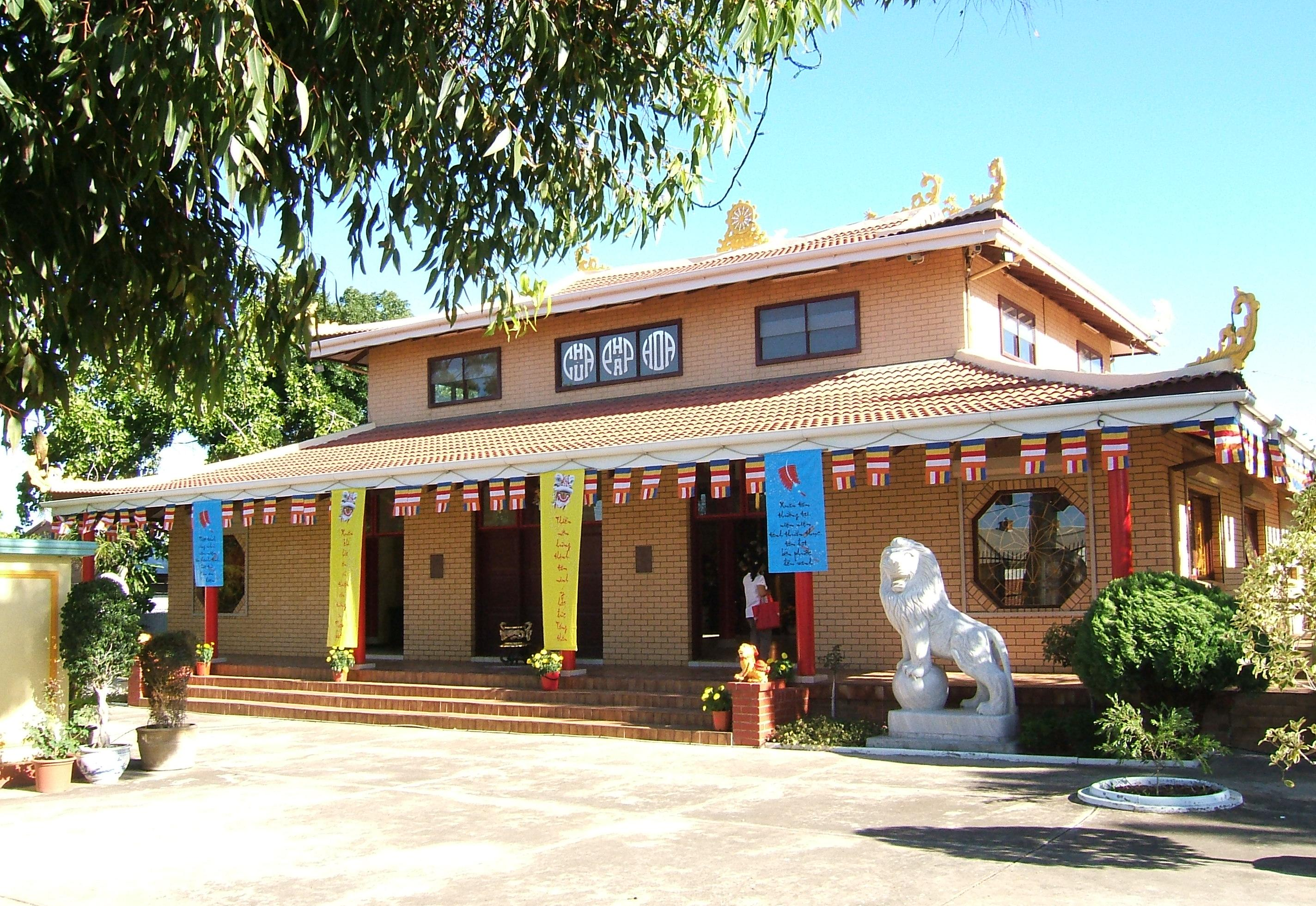 Phap Hoa Temple